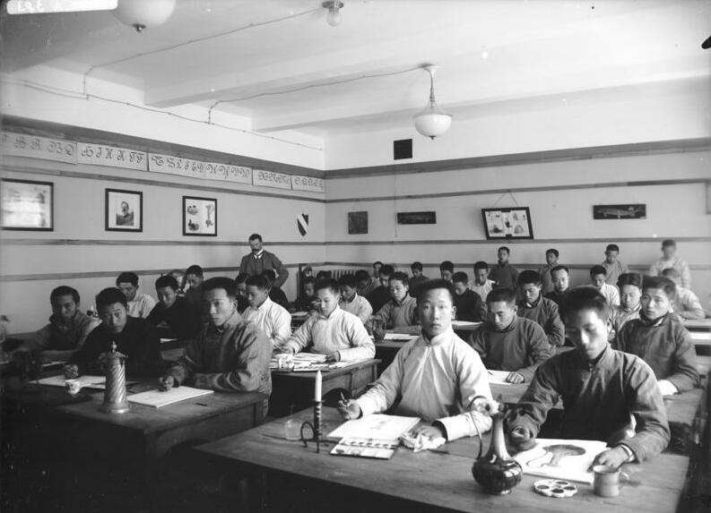 Schutzgebiet Kiautschou 1913: Tsingtau, eine Klasse der Hochschule im Zeichensaal